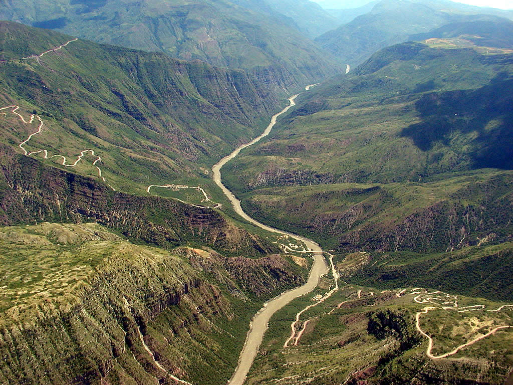 Cañon del Chicamocha. Via Giron - Zapatoca. 2005